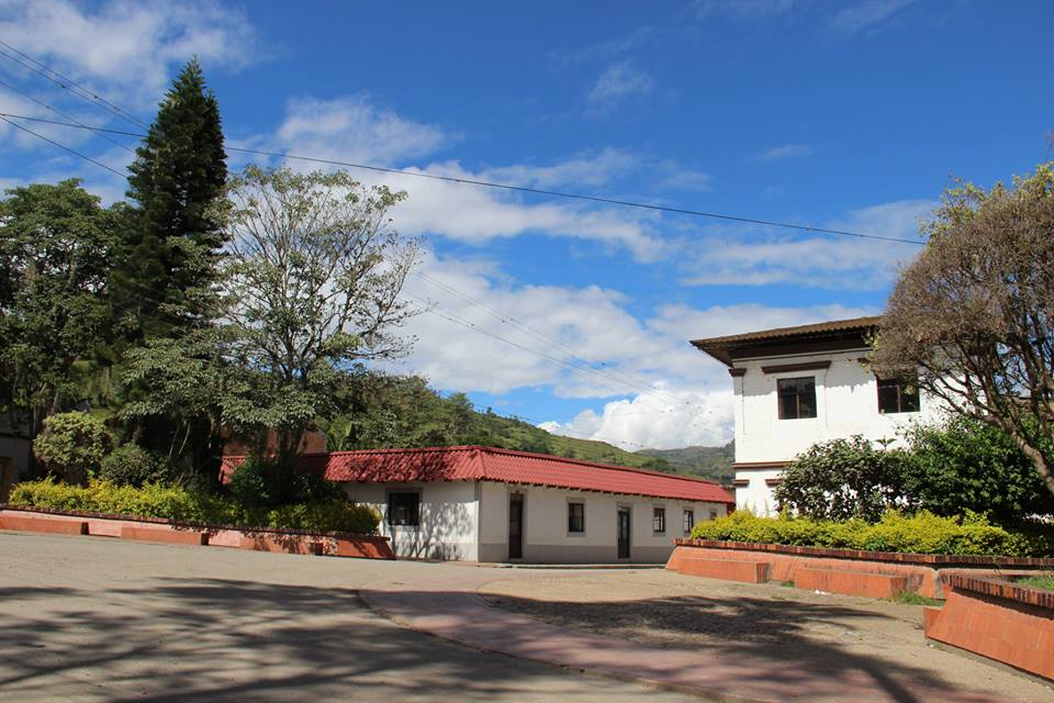 El asentamiento inicial de Fómeque se realiza sobre lo que hoy se conoce como la Unión, sin embargo se traslado a un valle de mayor elevacion que permite apreciar los territorios de Choachi y Ubaque. La Unión tiene un clima calido y una población relativamente pequeña, pero cuenta con una cantidad de atractivos que invitan al turista a conocer la riqueza ambiental del municipio y sus potencialidades como proveedor de turismo de naturaleza y aventura.